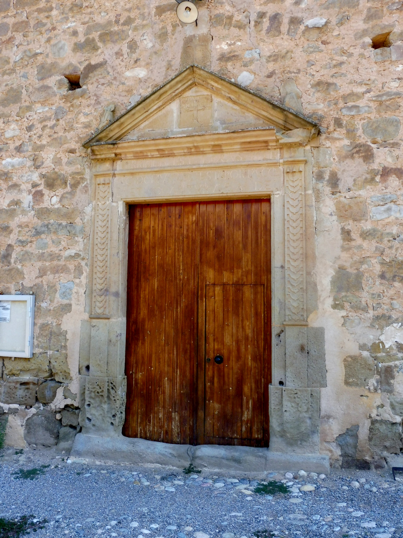 Església de Santa Maria de Sorba (Montmajor): portal de l'església